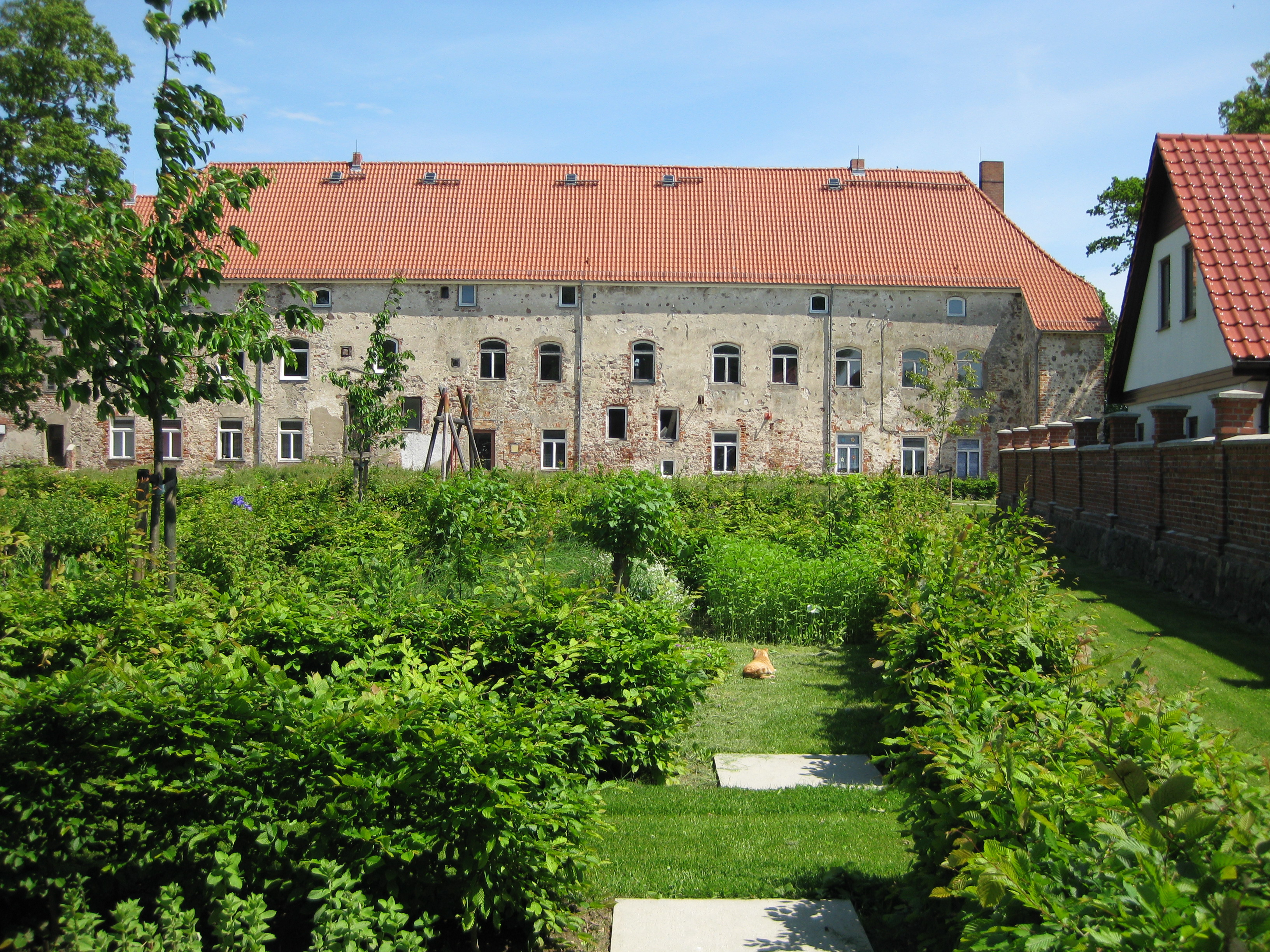 Klostergarten in Franzburg in der Mittagssonne.